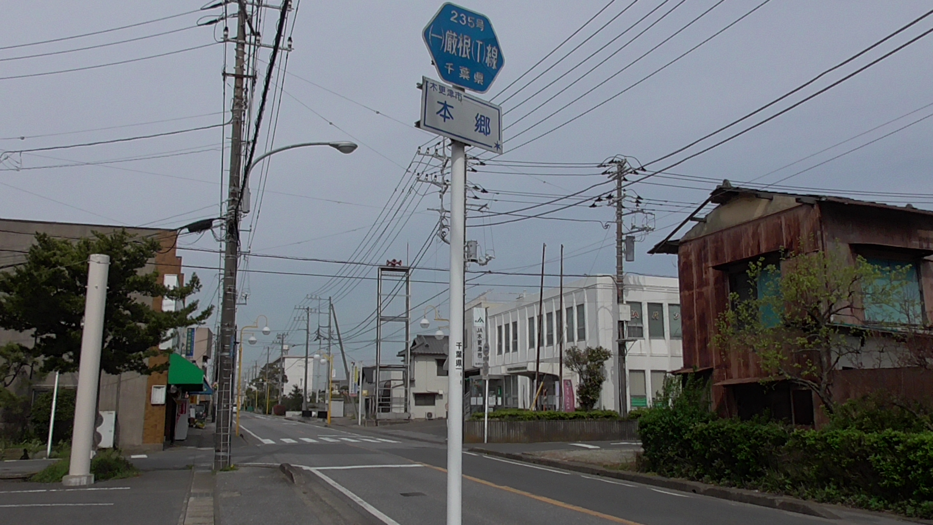 千葉県木更津市内のJR内房線巖根駅に向かう千葉県道235号巖根停車場線。